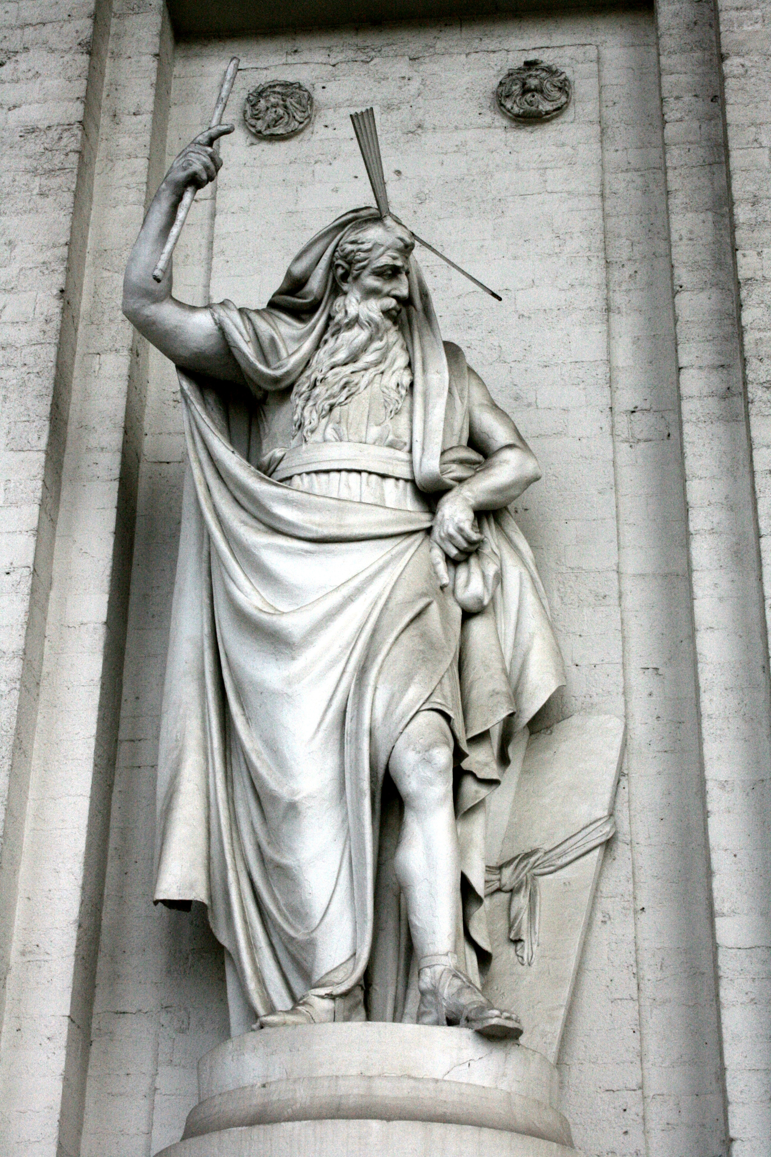 Église Saint Jacques sur-Coudenberg, place Royale, Bruxelles, Belgique. Sous le péristyle statue de Moïse